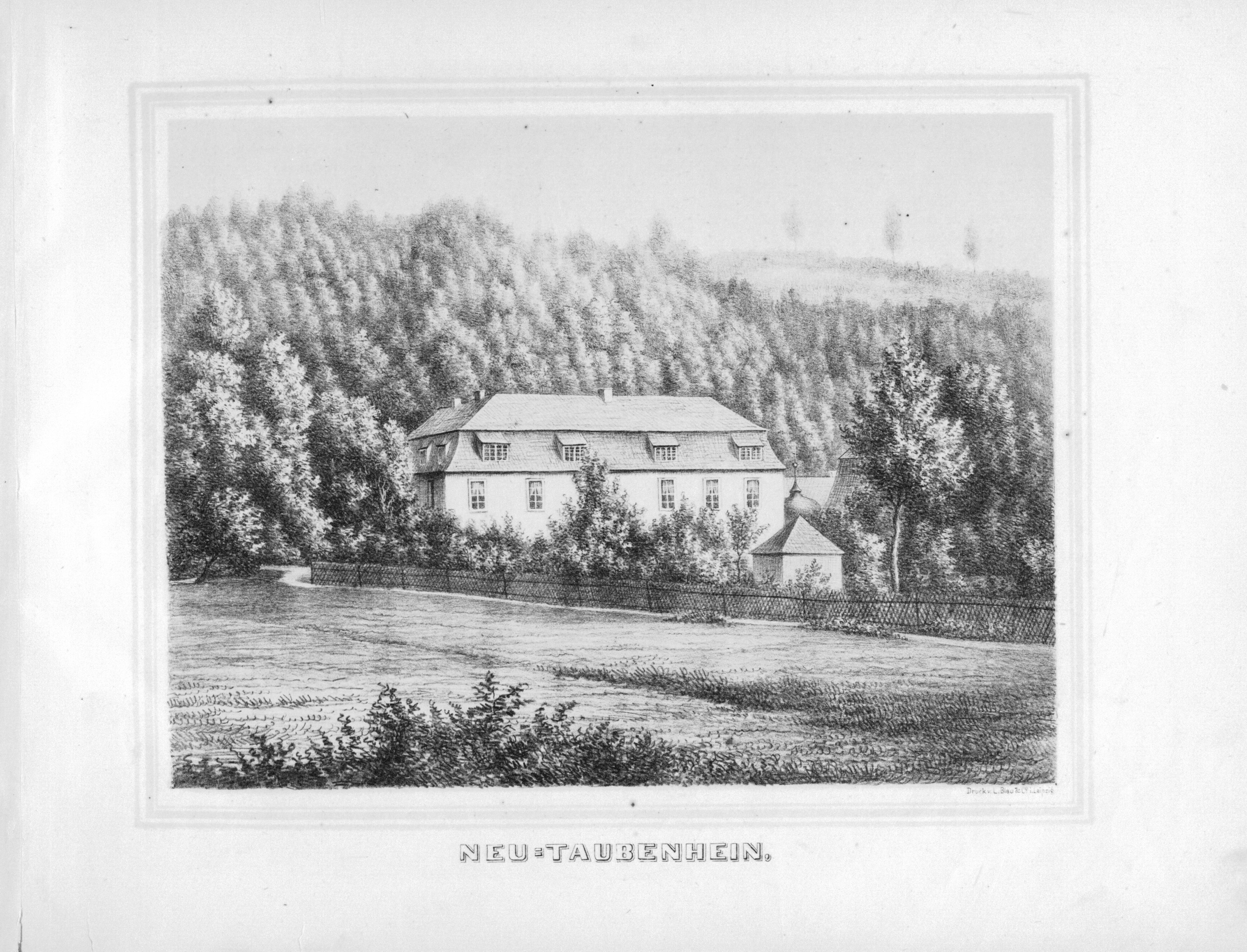 Neutaubenheim aus: Album der Rittergüter und Schlösser im Königreiche Sachsen Leipziger Kreis Section: I